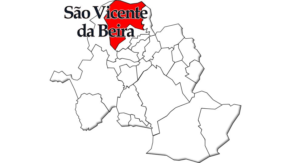 População